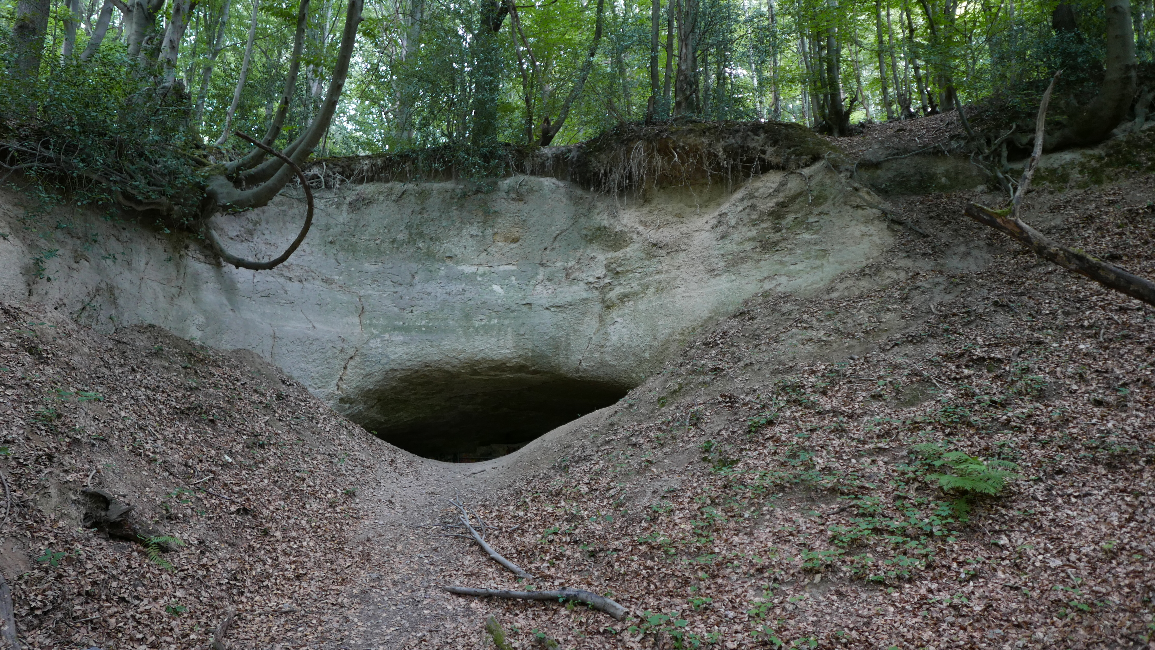 Eingang 38 zum P. Jos. Neffgen Stollen der Ofenkaulen im Siebengebirge. Wegen der Nutzung als Arbeitsstätte mit Zwangsarbeitern durch die Aero-Stahl Fluggerätebau GmbH wird dieser Eingang auch Aero-Stahl-Eingang genannt.